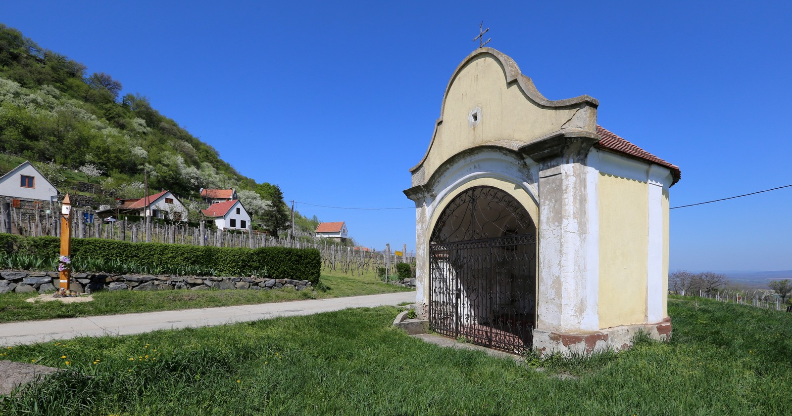 Somlóvásárhely, a Szent Margit-kápolna mögötti Keresztelő Szent János tiszteletére emelt piciny kápolna.